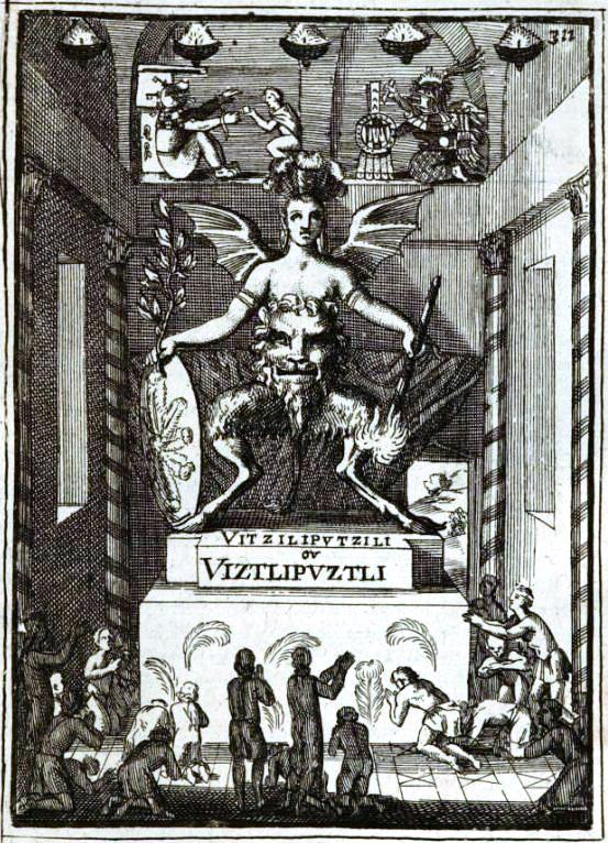 "Uitziliputzili" (planche 135)